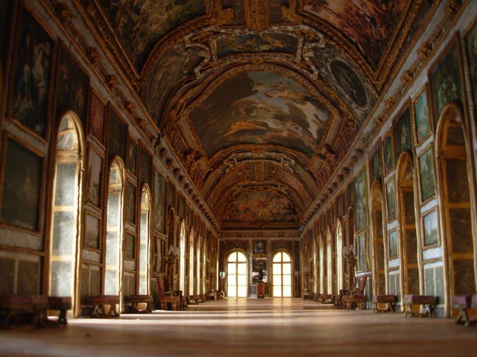 Vue de la galerie d'Apollon (voûte peinte par Pierre Mignard)